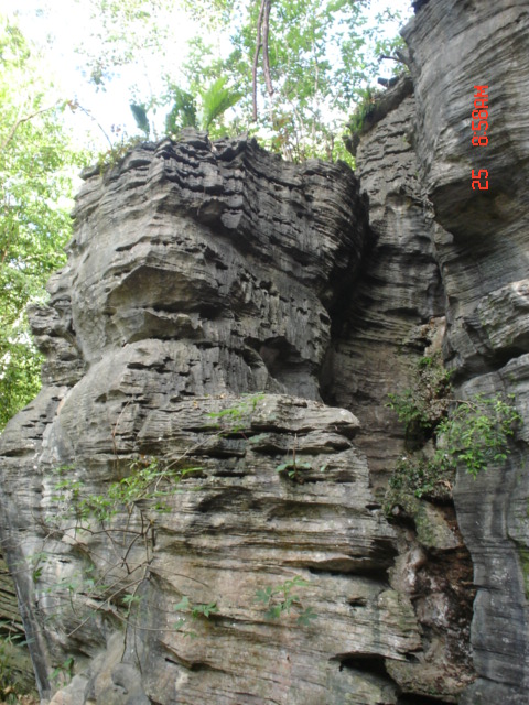 Formações rochosas de Lagoa Sante, MG, Brasil.